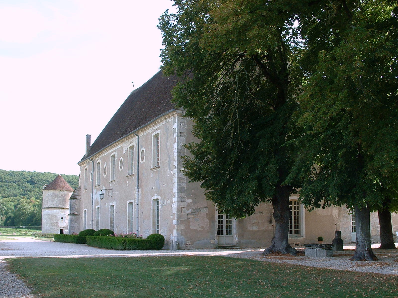 Ancienne abbaye cistercienne de Reigny (Vermenton, Yonne)